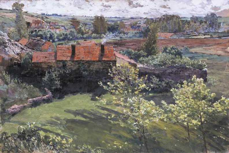 Červnový den (1898), tempera, lepenka, 71 x 105,5 cm